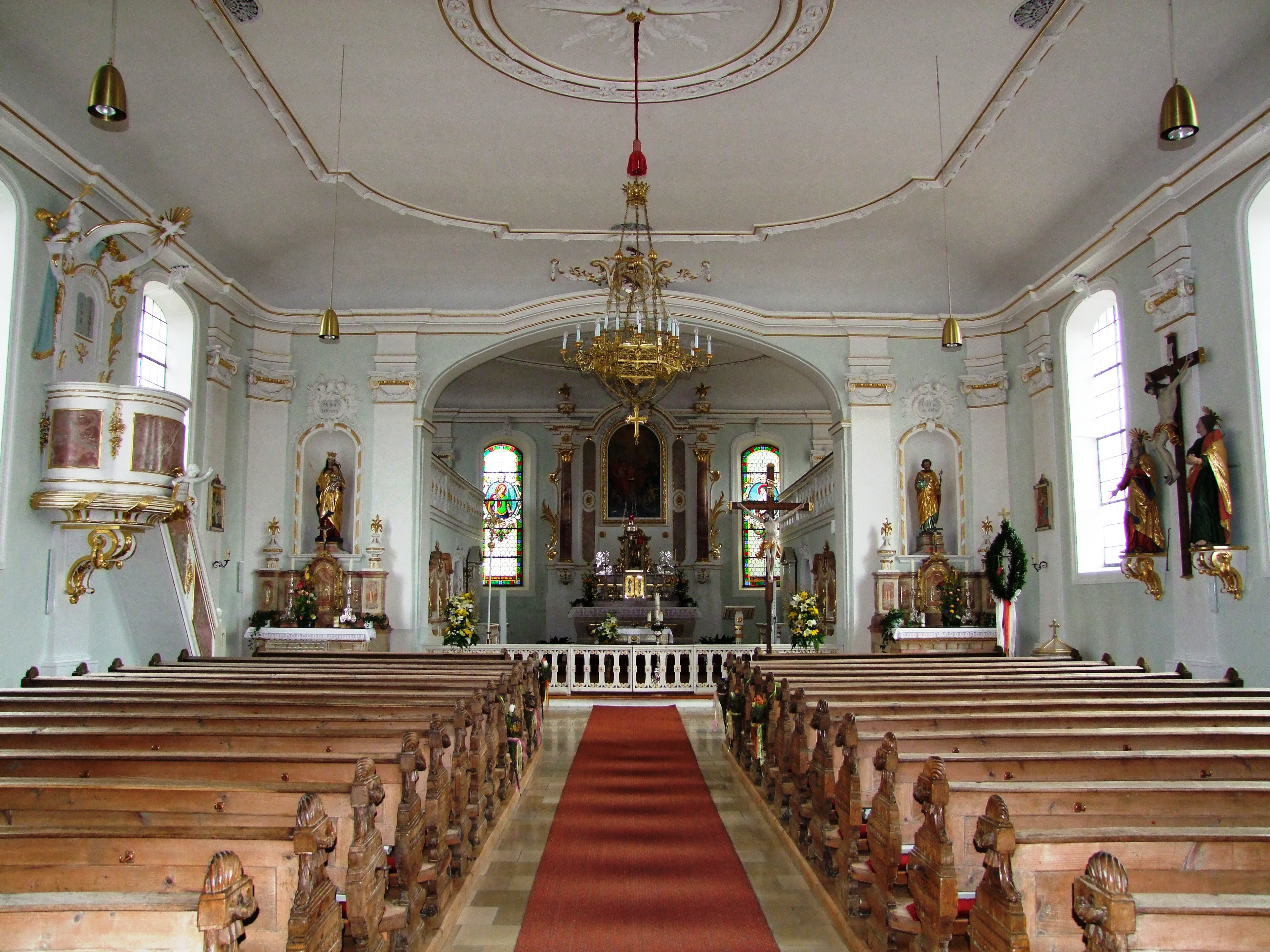 Die Zur-Heiligsten-Dreifaltigkeit-Kirche im oberschwäbischen Kronburg bei Memmingen